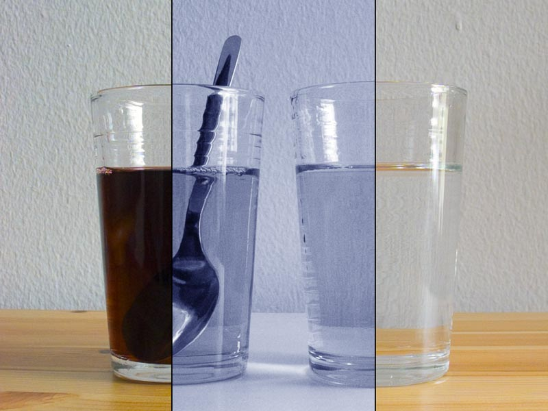 Feketeribizlilé és csapvíz összehasonlítása, kétoldalt látható, középen infravörös (850nm-1μm) fényben. Megfigyelhető, hogy a feketeribizlilé ebben a tartományban pont olyan átlátszó, mint a víz, ami viszont kicsit sötétebb, mint látható fényben